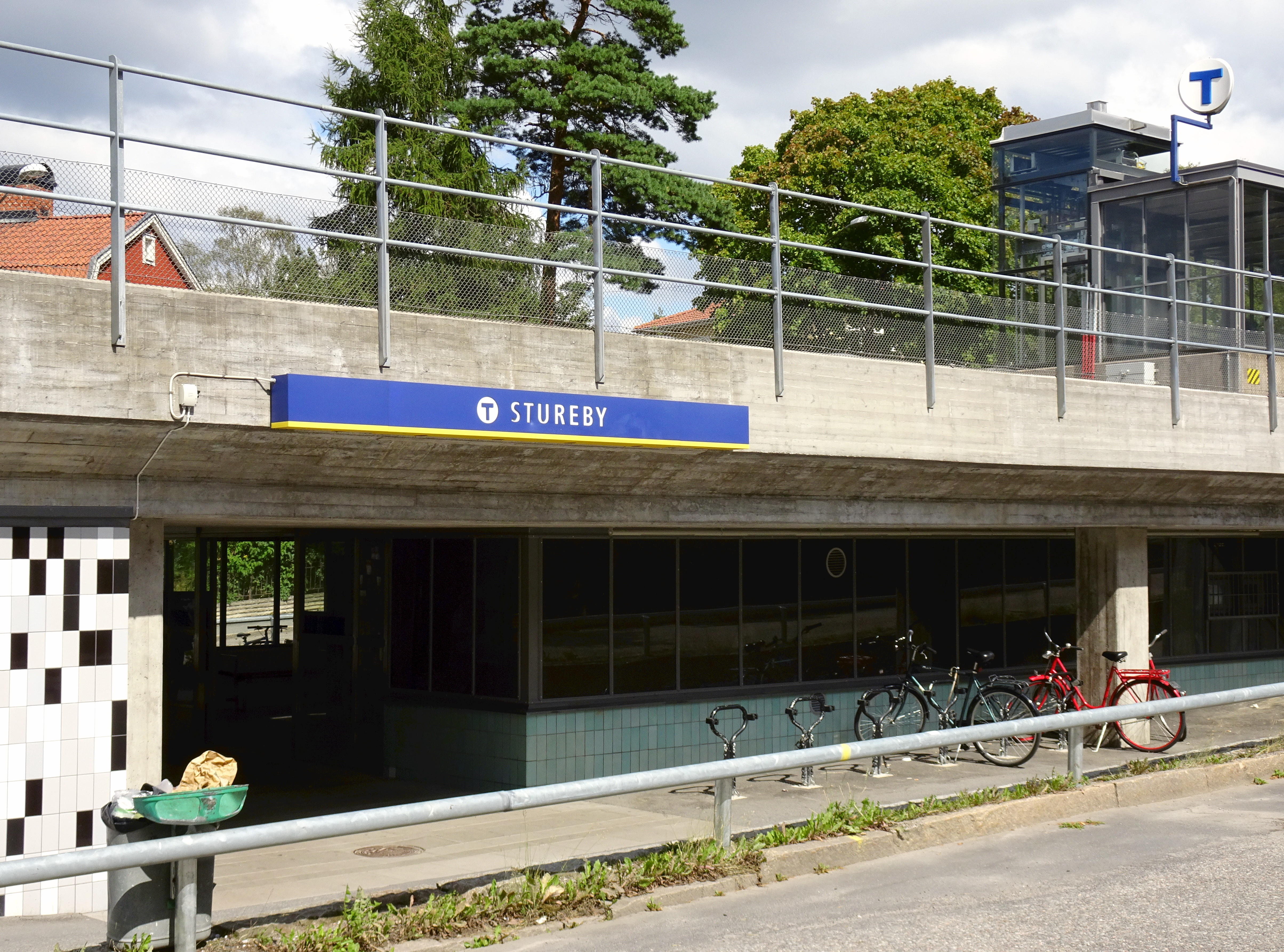 Stureby tunnelbanestation